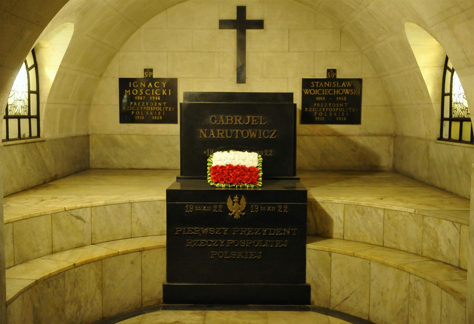 Krypta Gabriela Narutowicza w Bazylice Archikatedralnej Św. Jana Chrzciciela w Warszawie